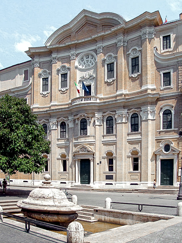 Oratorio dei Filippini a Roma, Facciata rinnovata